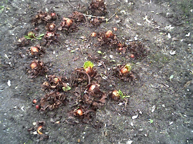 Rabarber. Serie foto's van een rabarberplant van 25 maart 2005 tot en met 13 mei 2005, één foto per week. Bestandsnamen: Rabarber-serie-1.jpg tot Rabarber-serie-8.jpg. Foto zelf gemaakt. Public Domain.